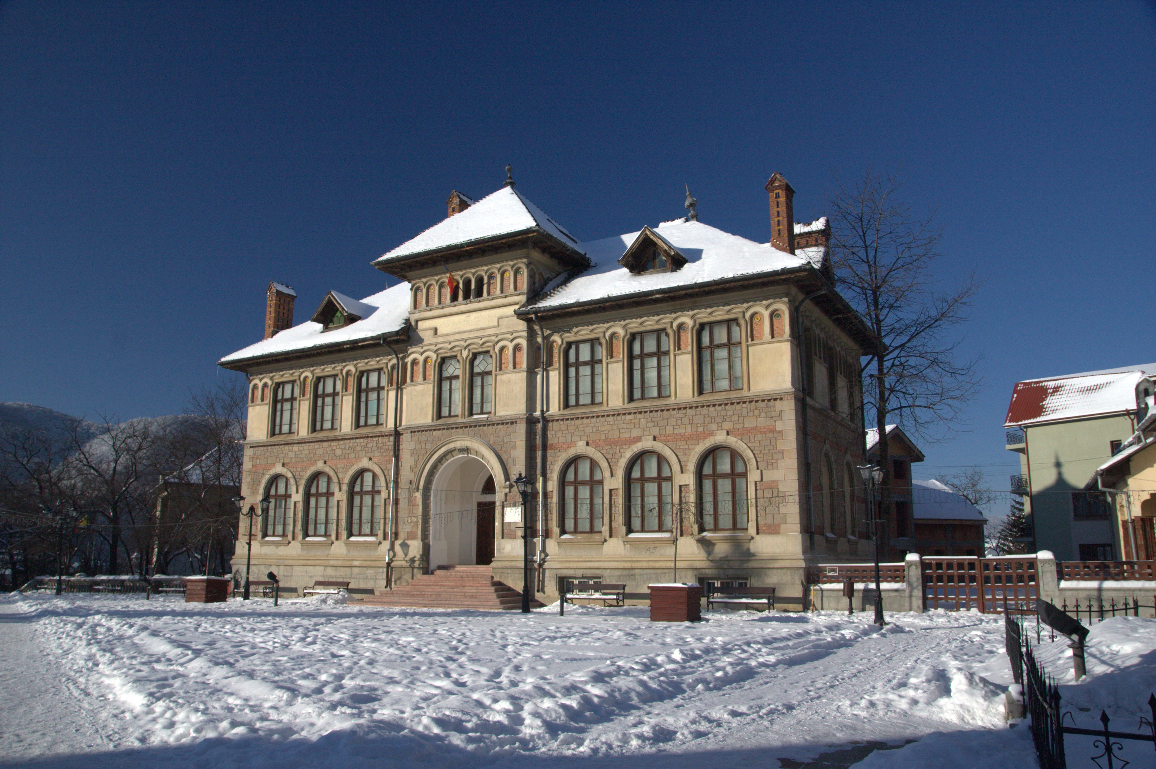 Casă azi Muzeul de Etnografie